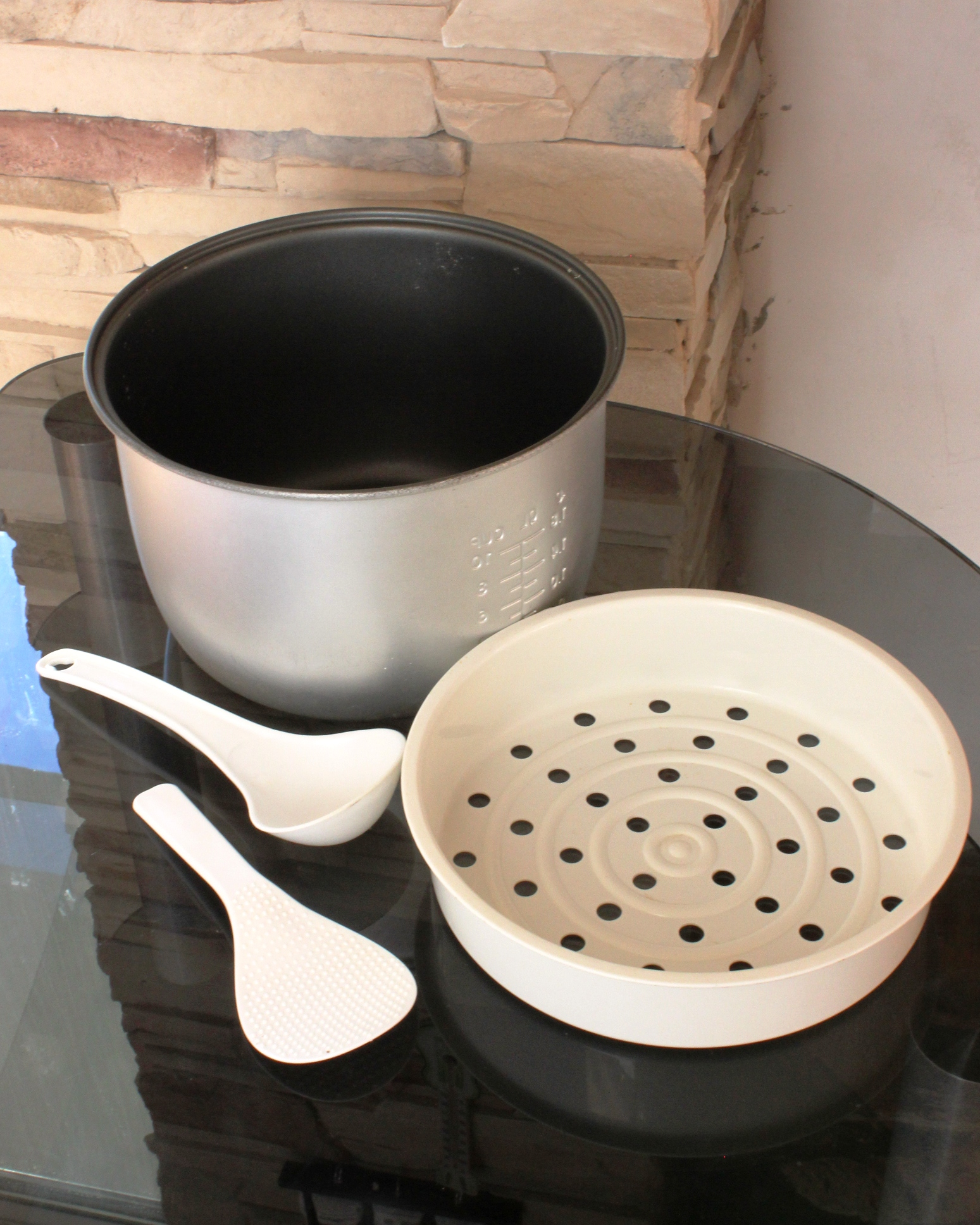 Мультиварка. Комплектация.